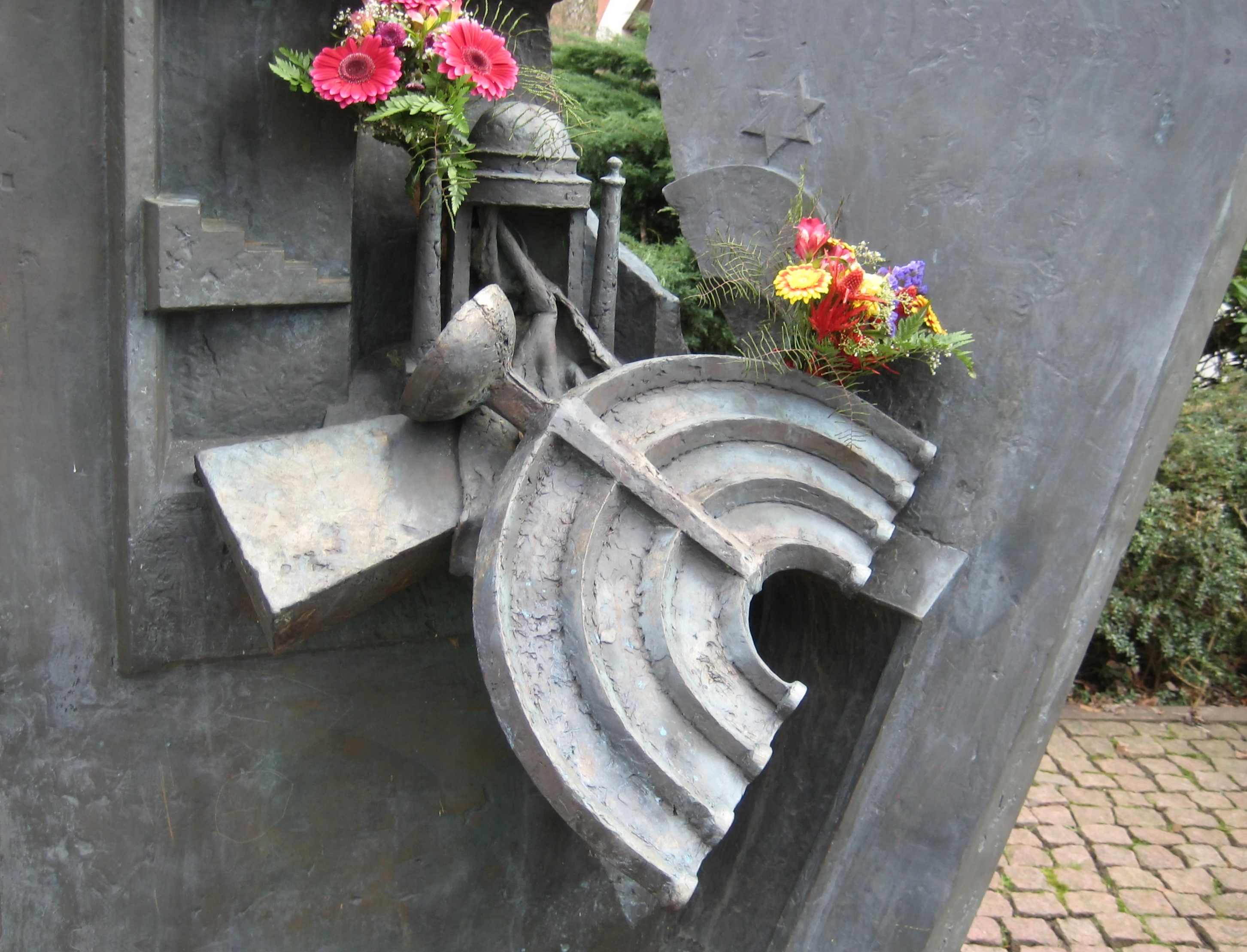 Detailansicht des Mahnmals zur Erinnerung an die Zerstörung der Kieler Synagoge Goethestraße während der Reichspogromnacht 1938. Das Mahnmal wurde 1989 von der Bildhauerin Doris Waschk-Balz geschaffen.Standort: Auf dem früheren Synagogengrundstück in der Goethestraße/Ecke Humboldtstraße in Kiel-Schreventeich in Schleswig-Holstein, Deutschland.